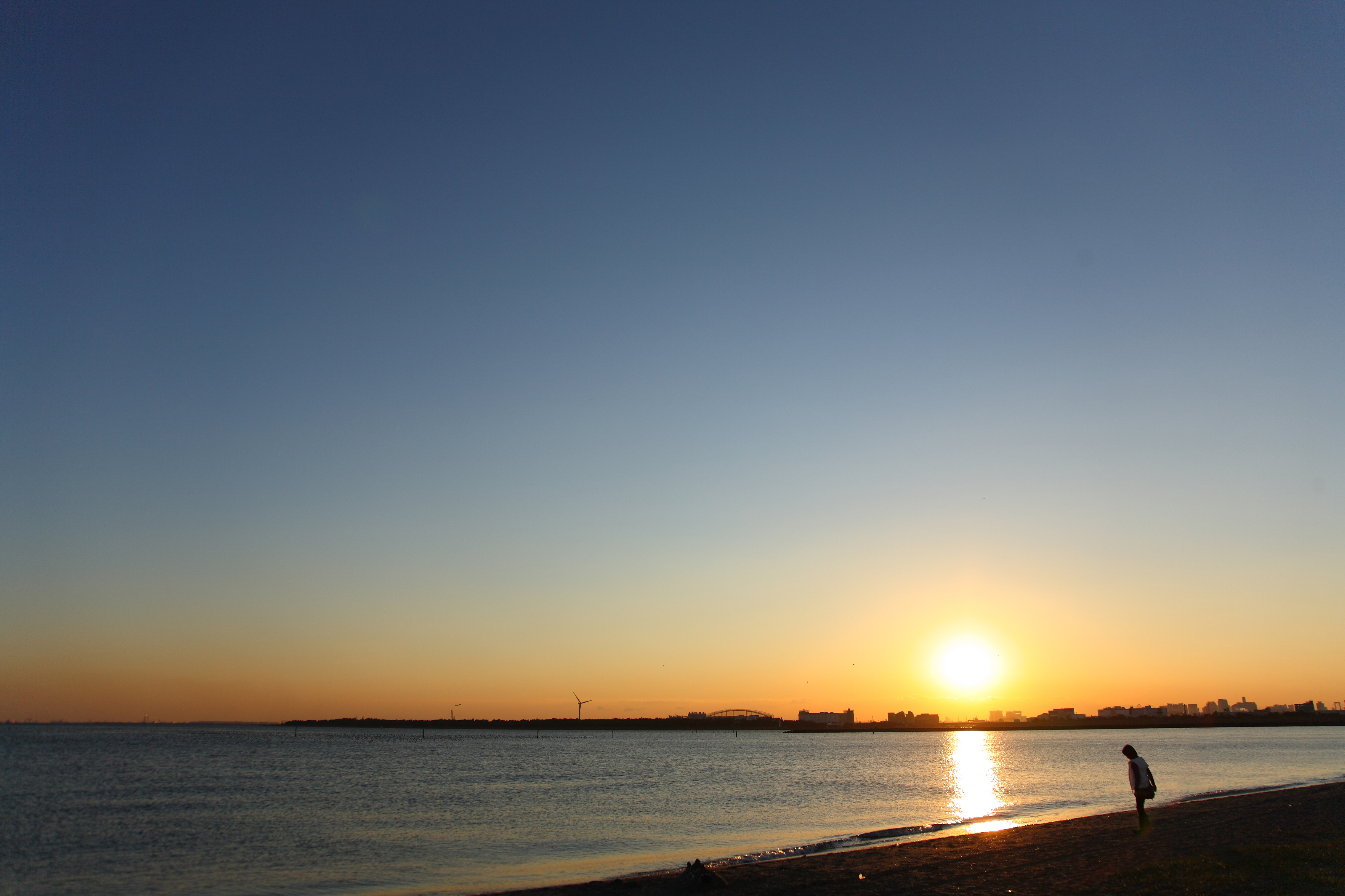 葛西海浜公園・西なぎさから見た夕日。東京都江戸川区。撮影者のブログはこちら。